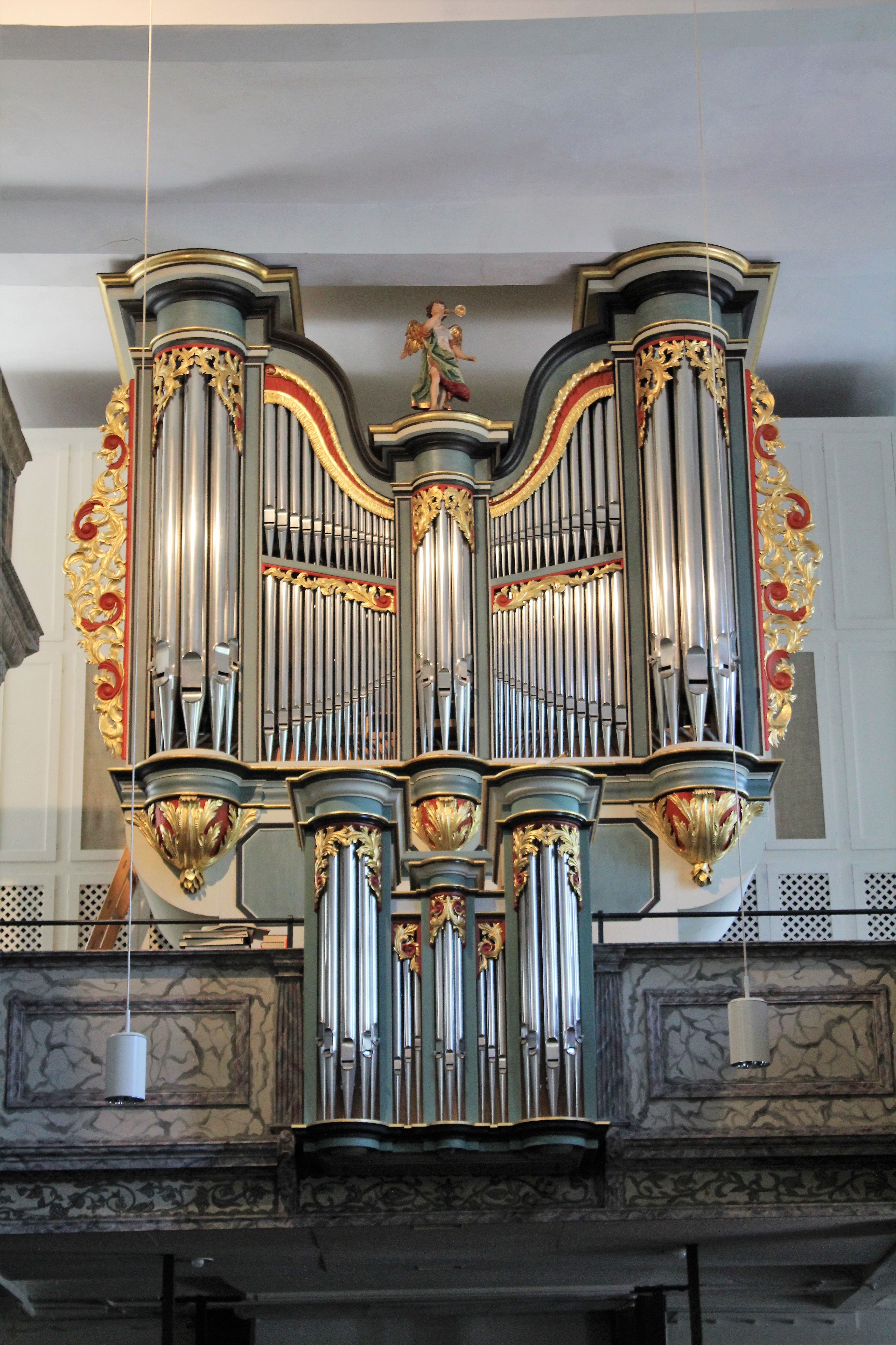 Evangelische Stadtkirche Dillenburg, Hessen, Deutschland